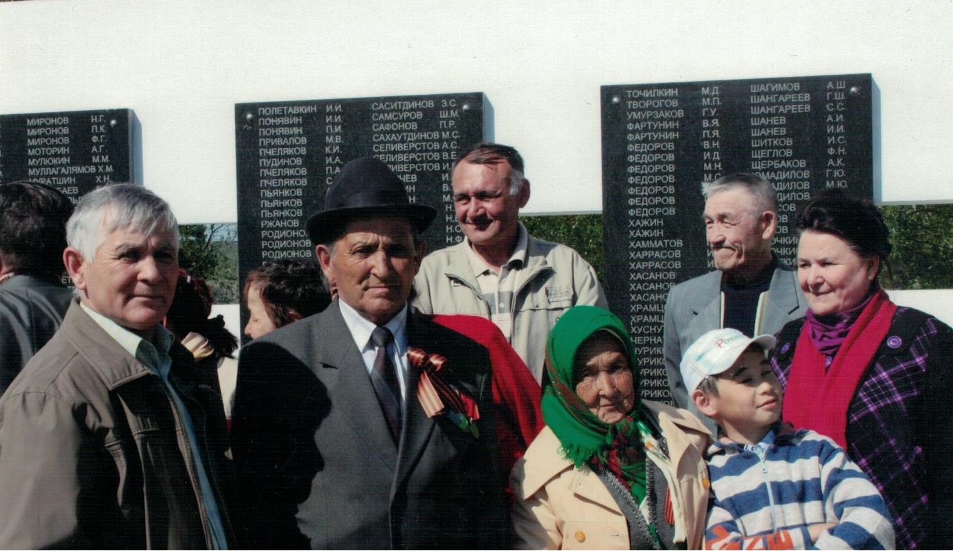 Памятник участникам войны в д. Татлы и благодарные потомки воинов